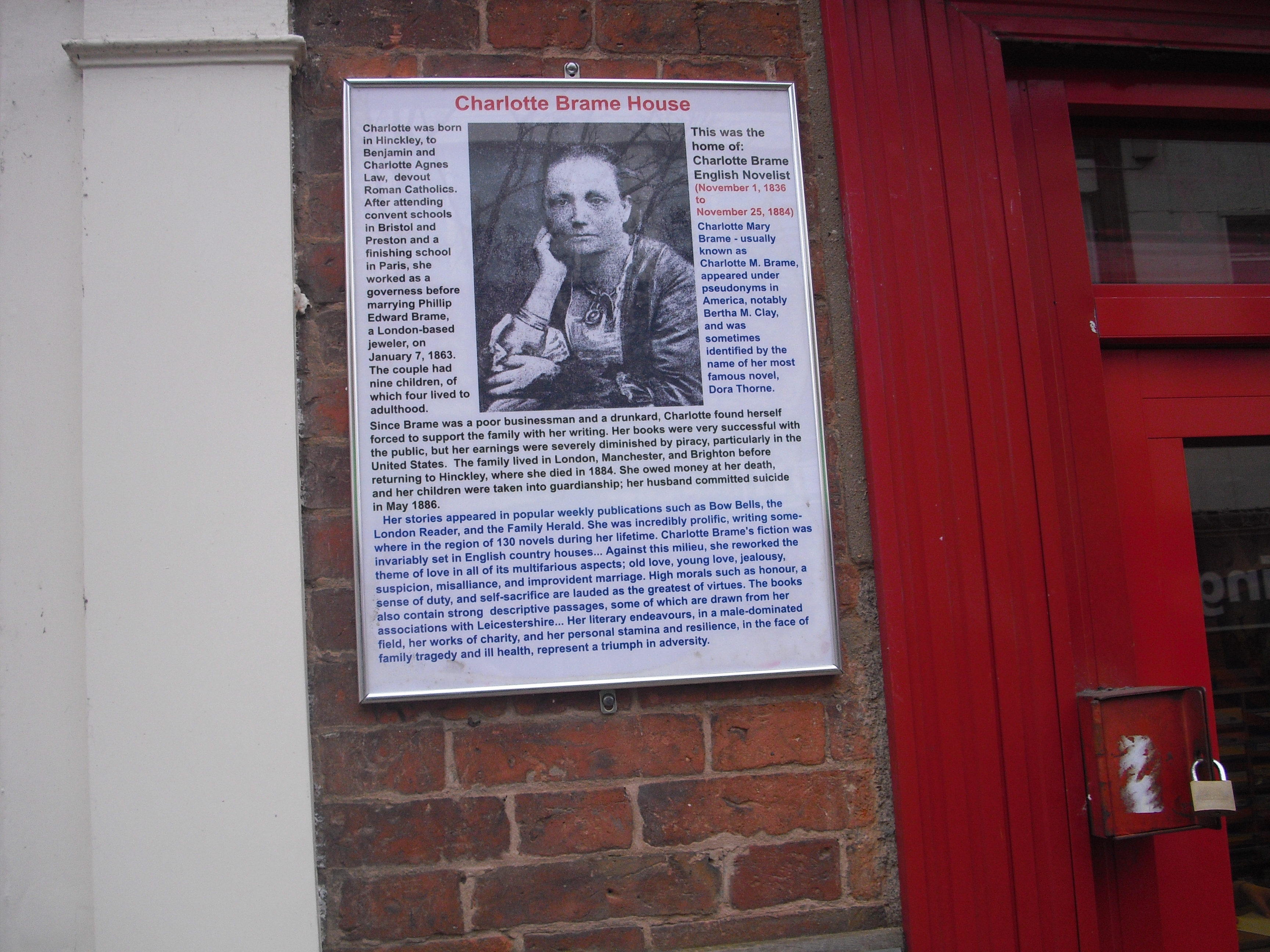 Tablica pamiątkowa na domie Charlotte Mary Brame w Hinckley